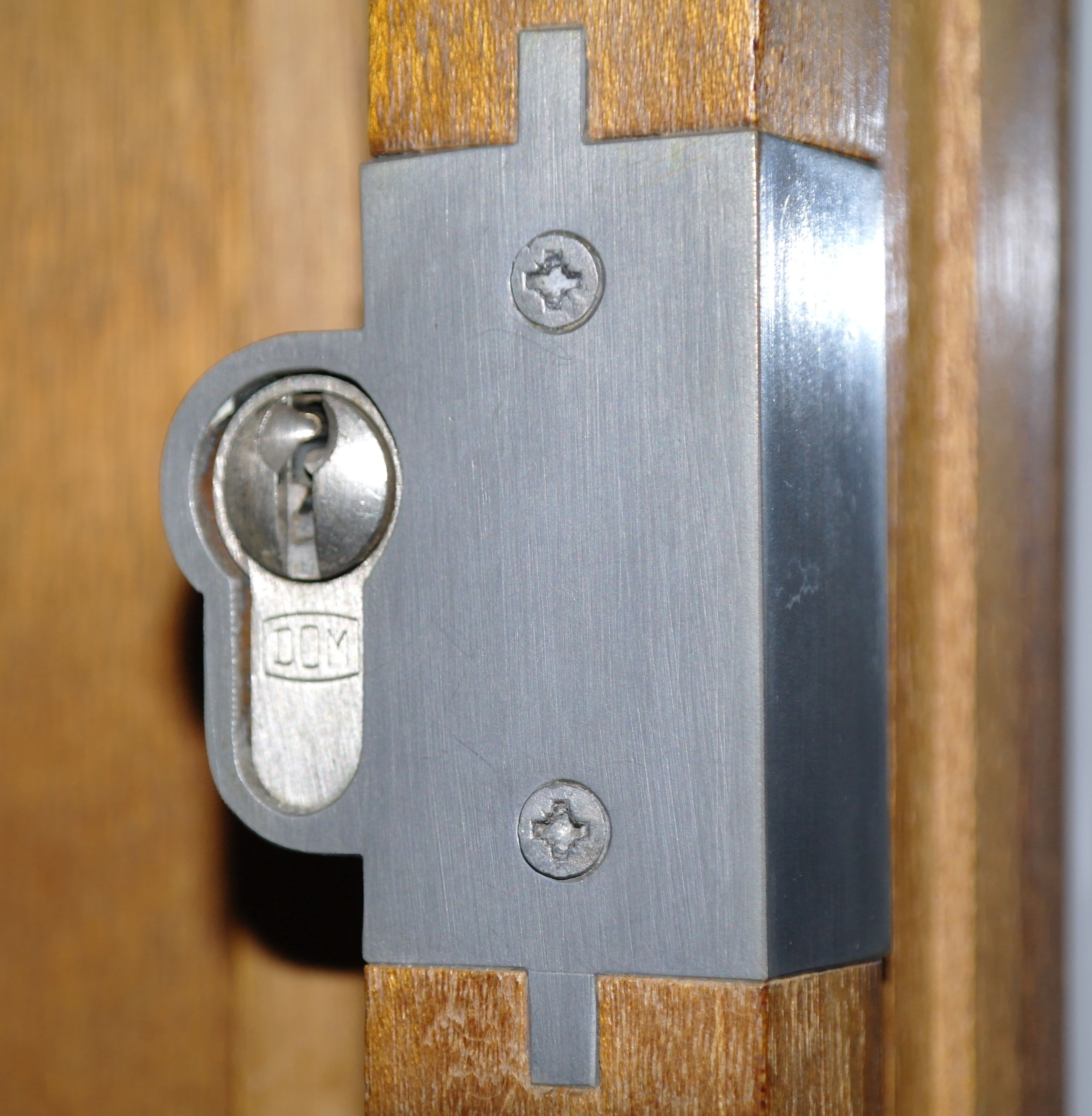 Haus Heinze, Detail: Einbindung Türschloss-Zylinder